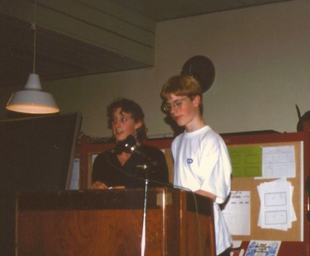 Mellem juli 1992 og marts 1993 havde Folkeskoleelevernes Landsorganisation (FLO) to formænd, der styrede organisationen i fællesskab. Her ses de med et fælles indlæg på FLOs. 10. delegeretmøde i oktober 1992.